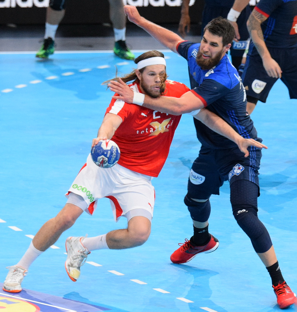 Le 10 janvier 2016 lors du match France / Danemark durant la Golden League à l'AccorHotels Arena (Paris).